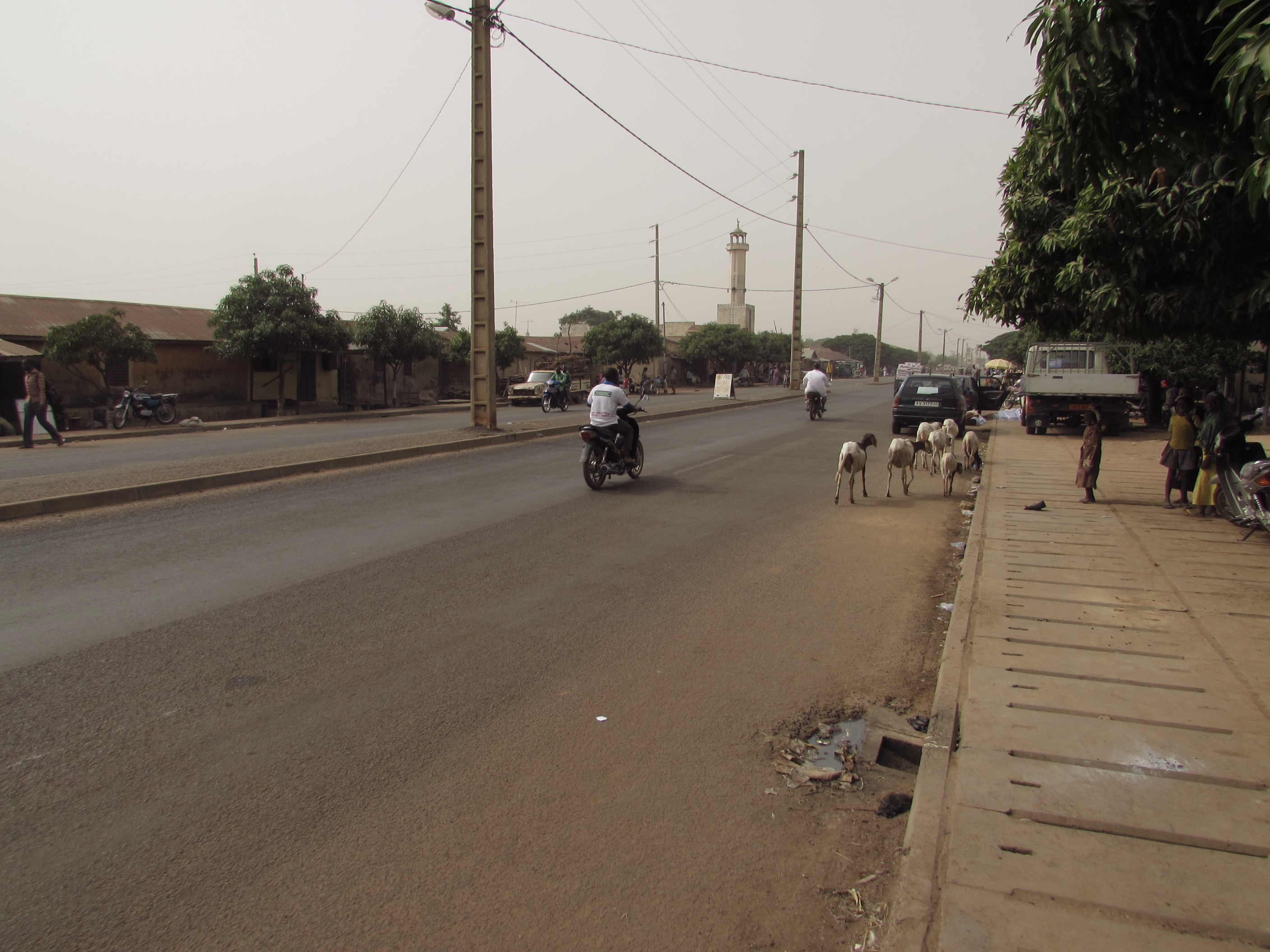 straßenbild in djougou, benin